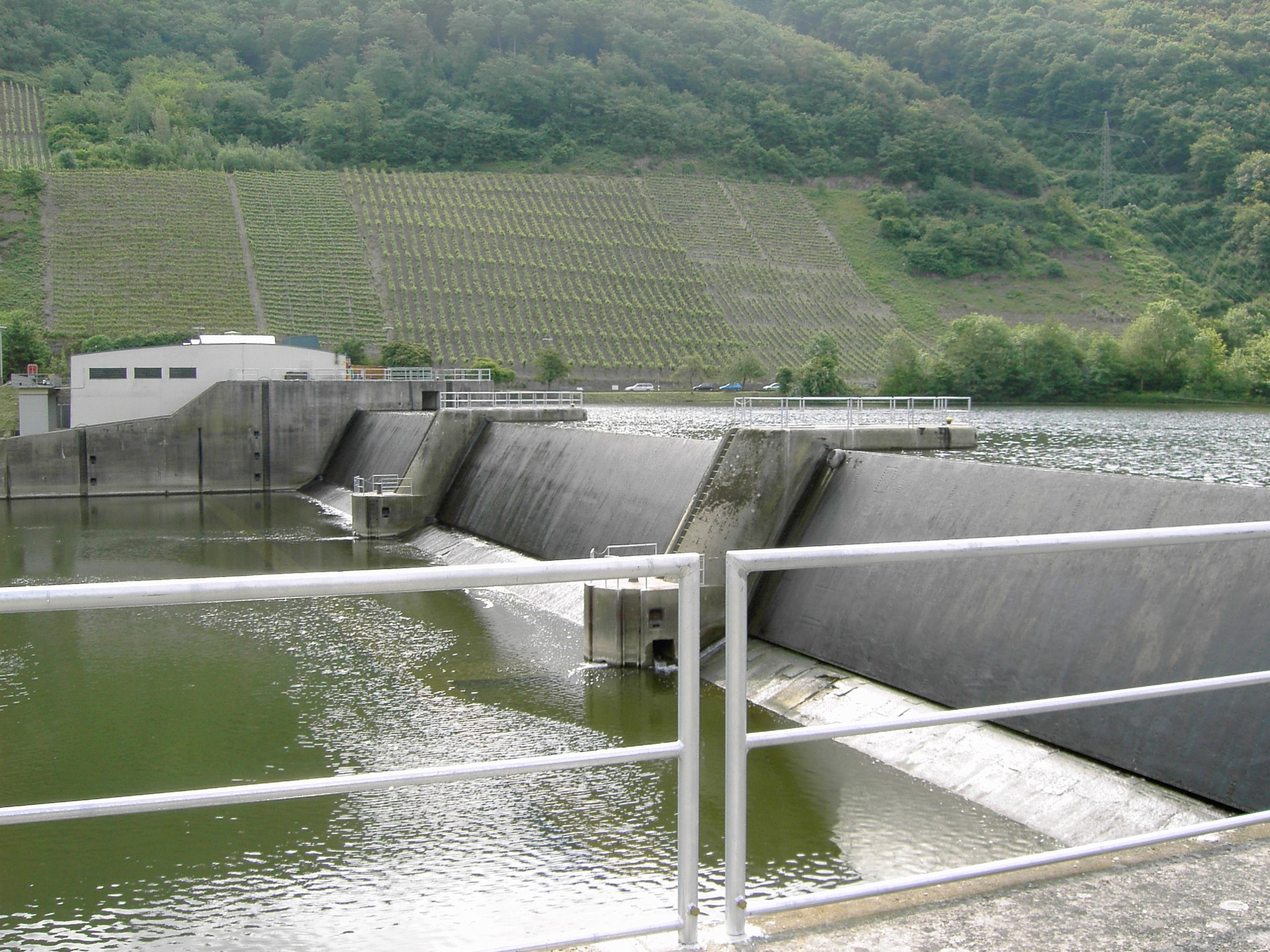 Staustufe Lehmen